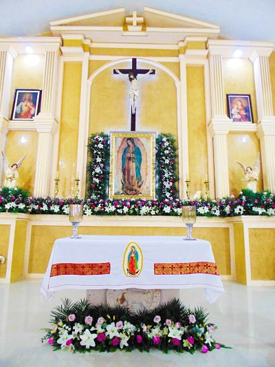 templo